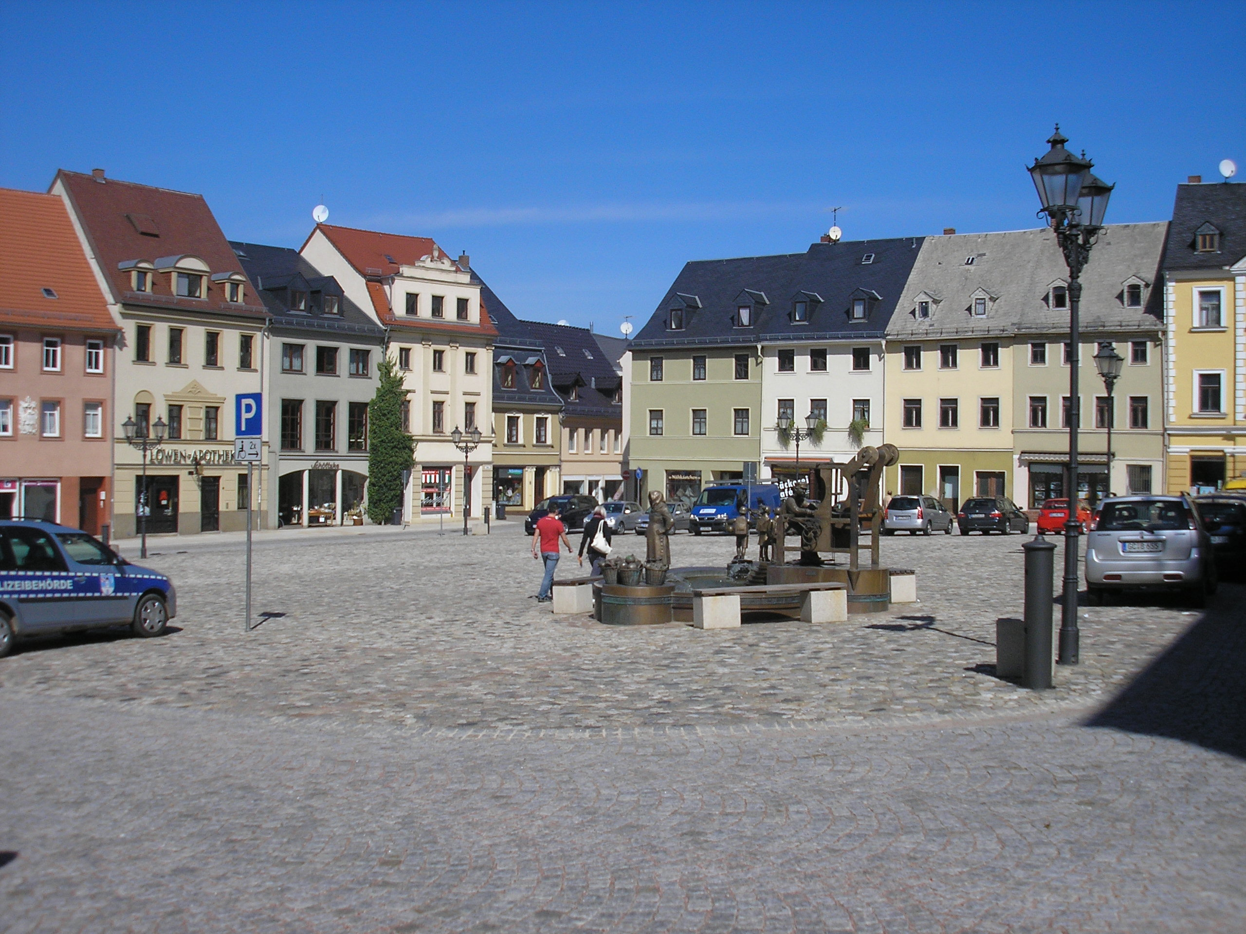 Der Marktplatz in Glauchau (Sachsen).